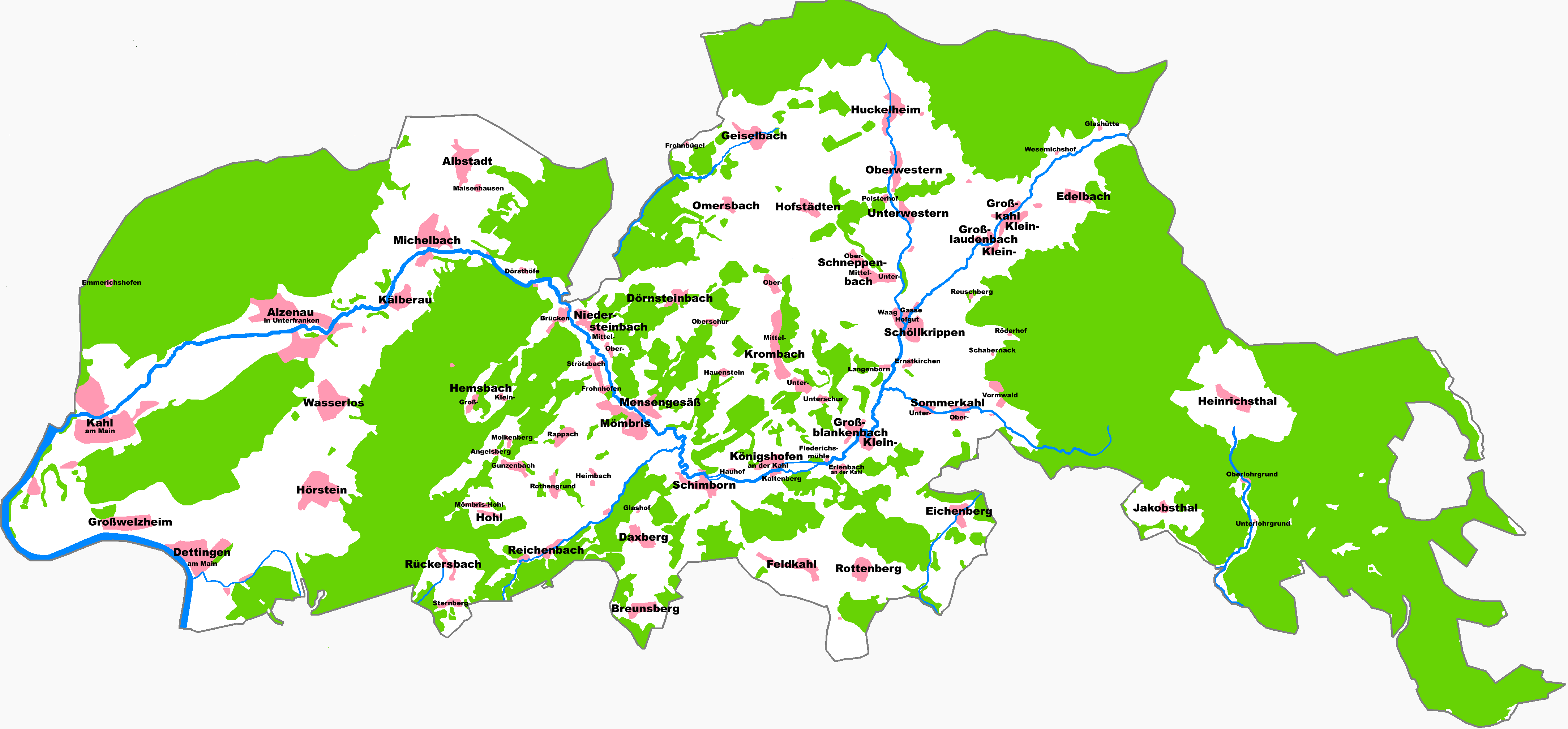 Der Landkreis Alzenau um 1950 Grünfläche, Wiesen Siedlungsfläche Wald Gewässer Landkreisgrenze